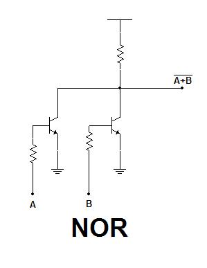 Puerta NOR con transistores